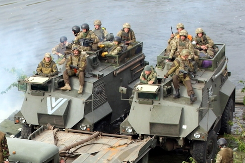 AT105 Saxon Вооруженных сил Украины